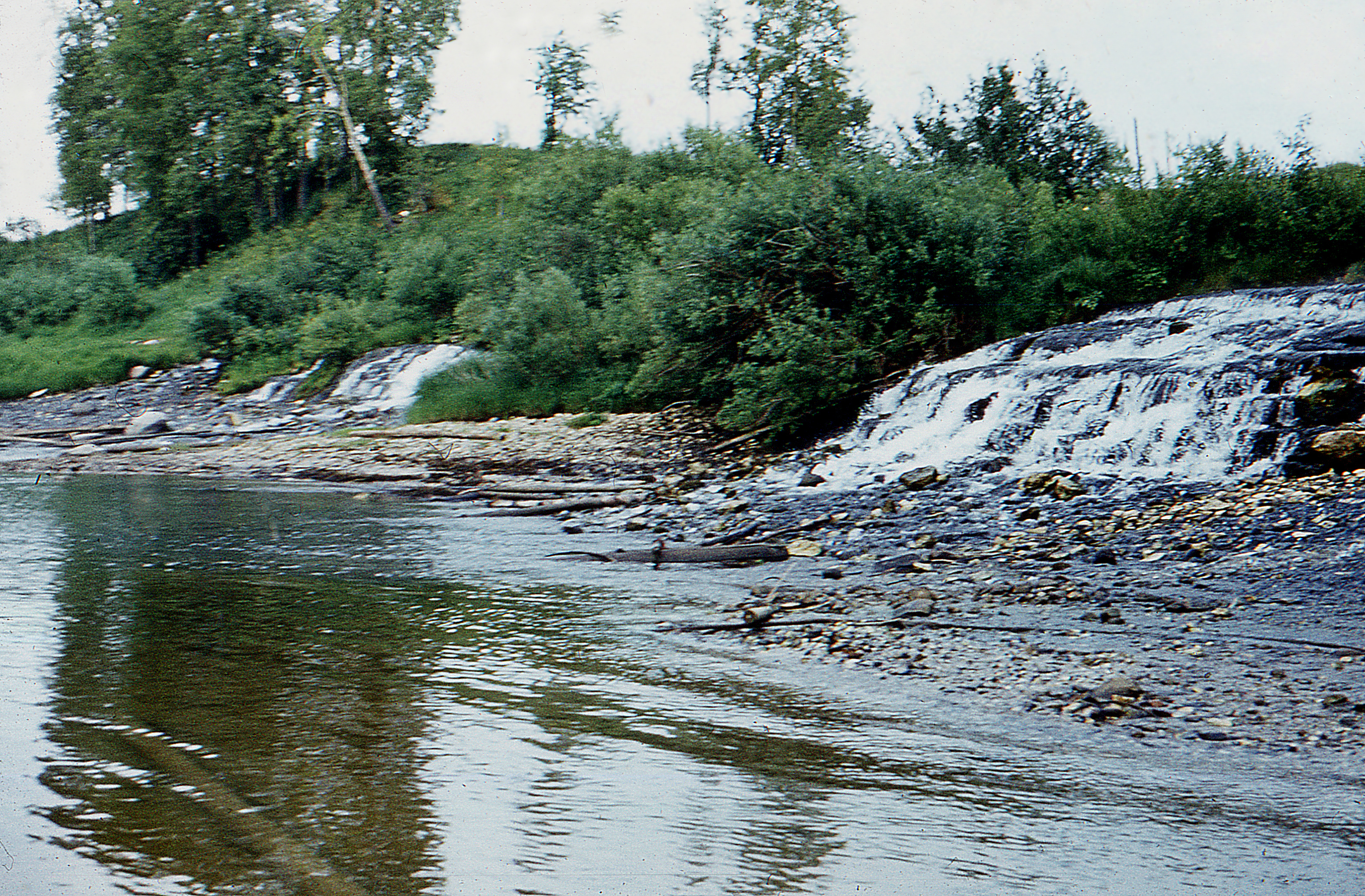 Мощный выход подземных вод.Река Онега.